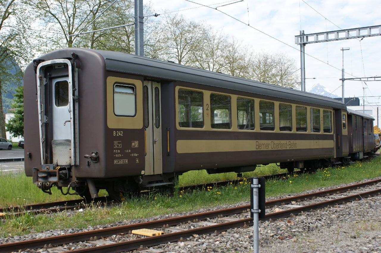 BOB Einheitswagen SIG Typ 1 mit Aluminiumkasten B 242 noch im braunen Anstrich abgestellt in Interlaken Ost